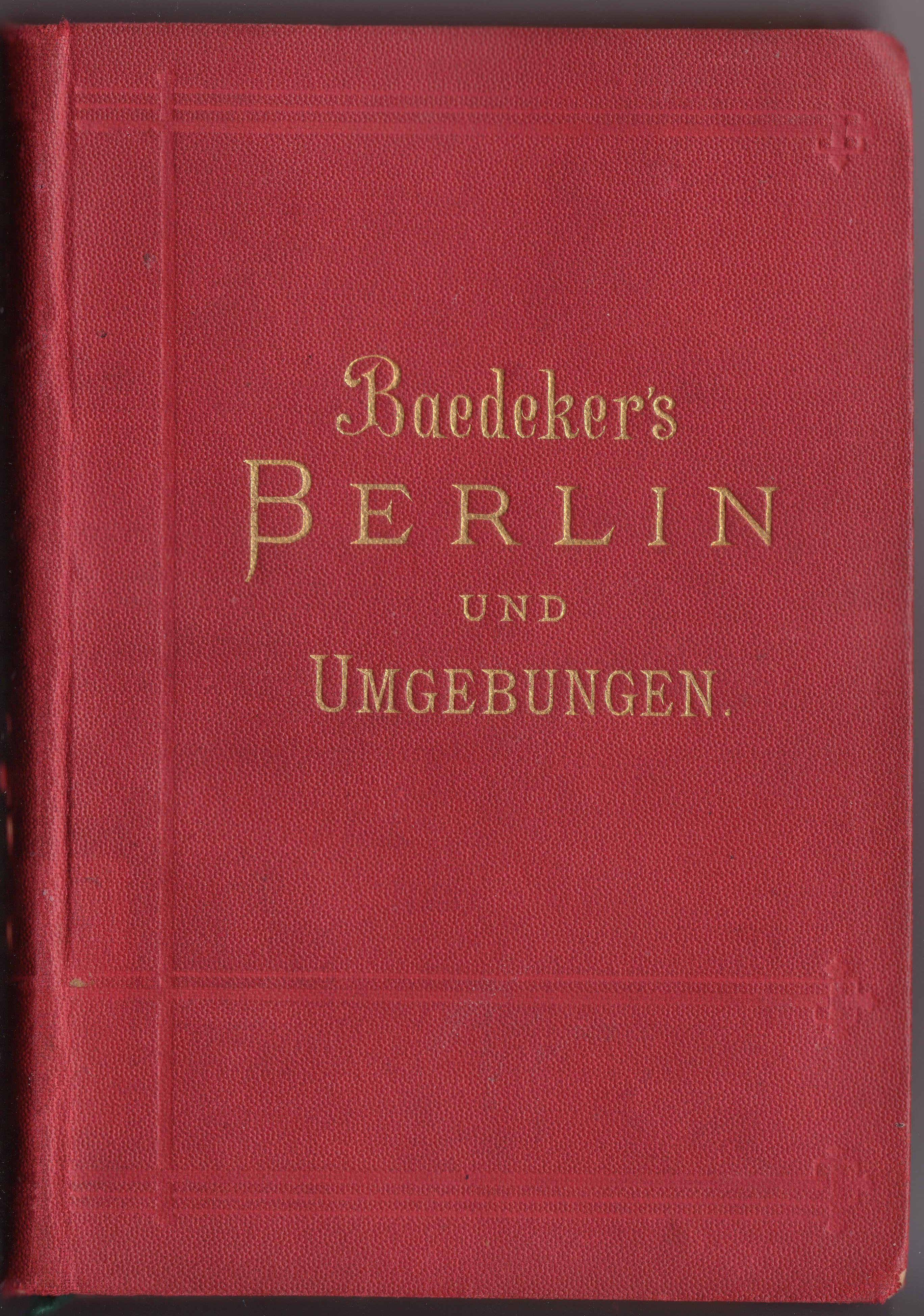 Baedeker, Berlin 1900, Vorderdeckel